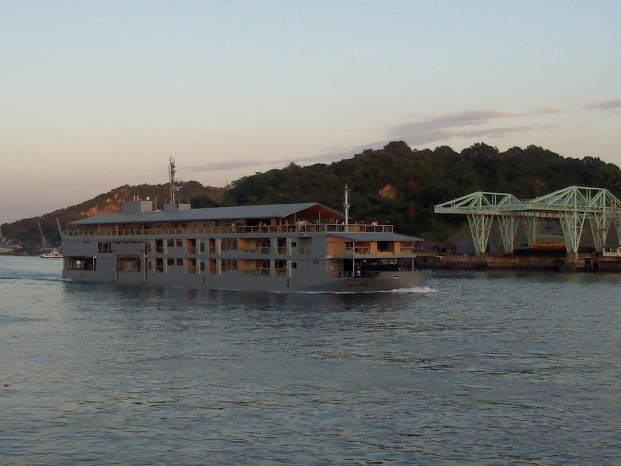 船の画です